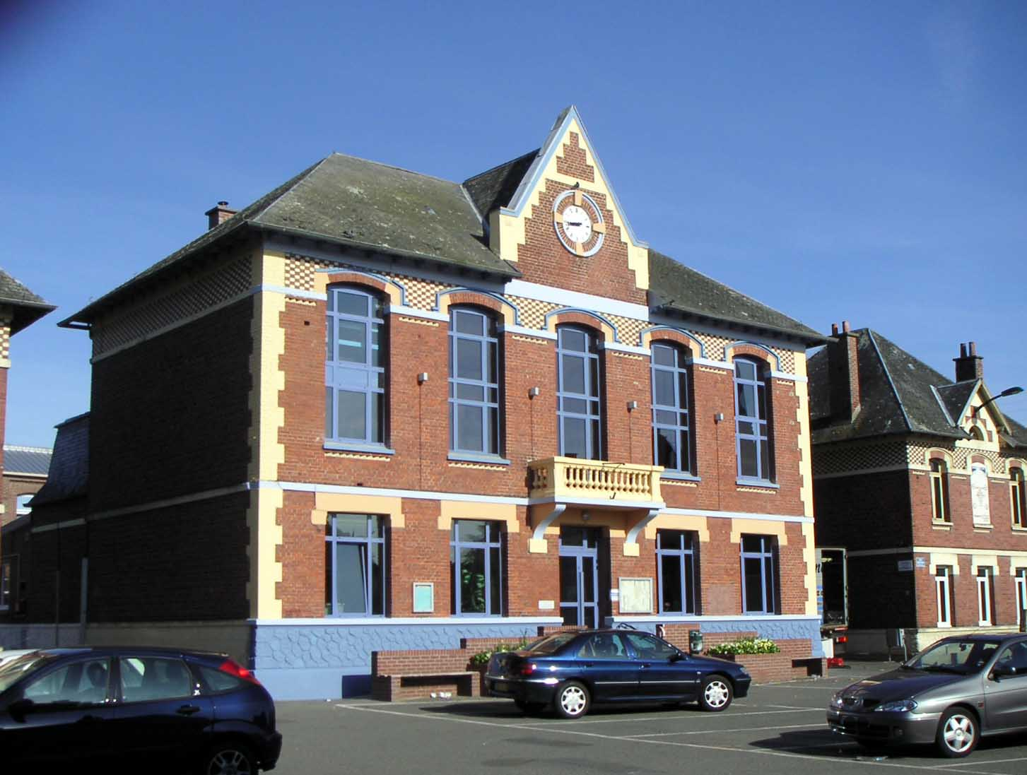 FaÃ§ade de la mairie d'Arleux (Nord) Padawane